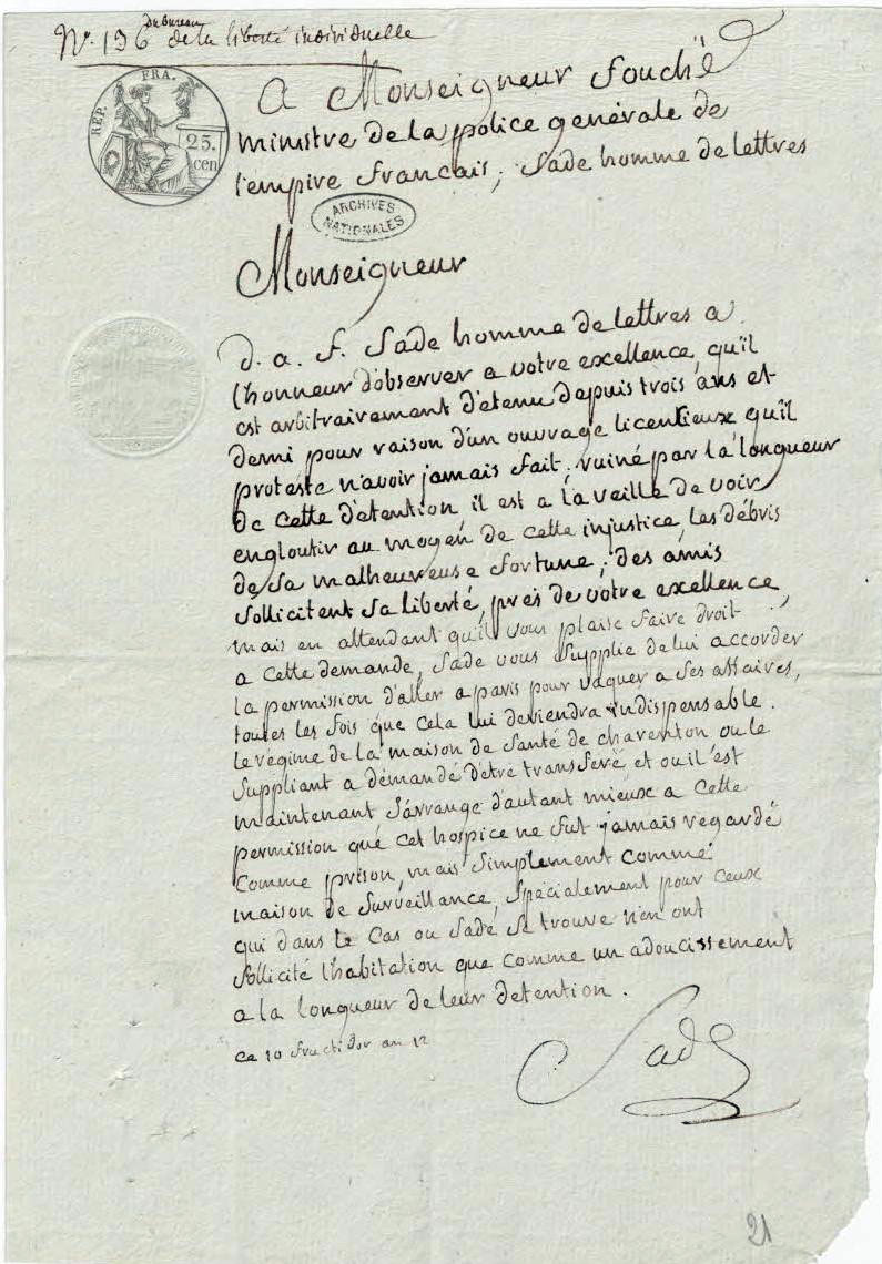 Supplique adressée par le marquis de Sade à Fouché, ministre de la police, demandant l’assouplissement de sa détention datée du 10 fructidor an XII